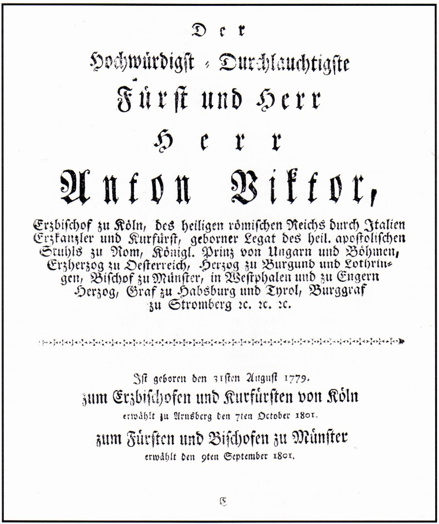 Widmung für Kurfürst Anton Victor 1802